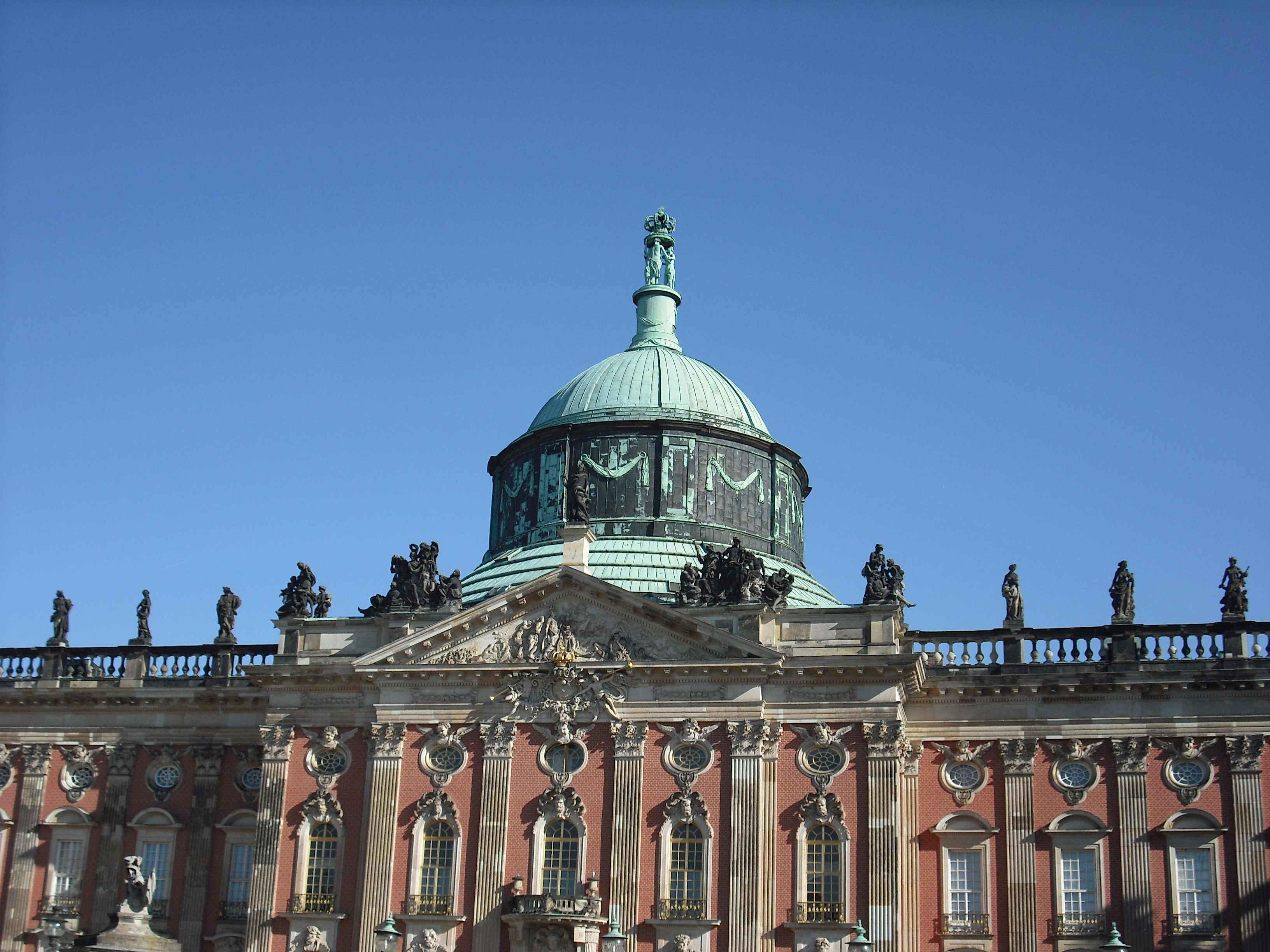 Neues Palais - Sanssouci - Potsdam - Duitsland